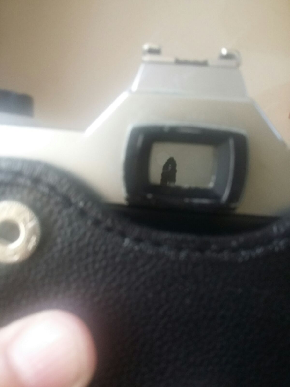 Mancha de oxidação no visor da Pentax K1000 de fabricação chinesa.